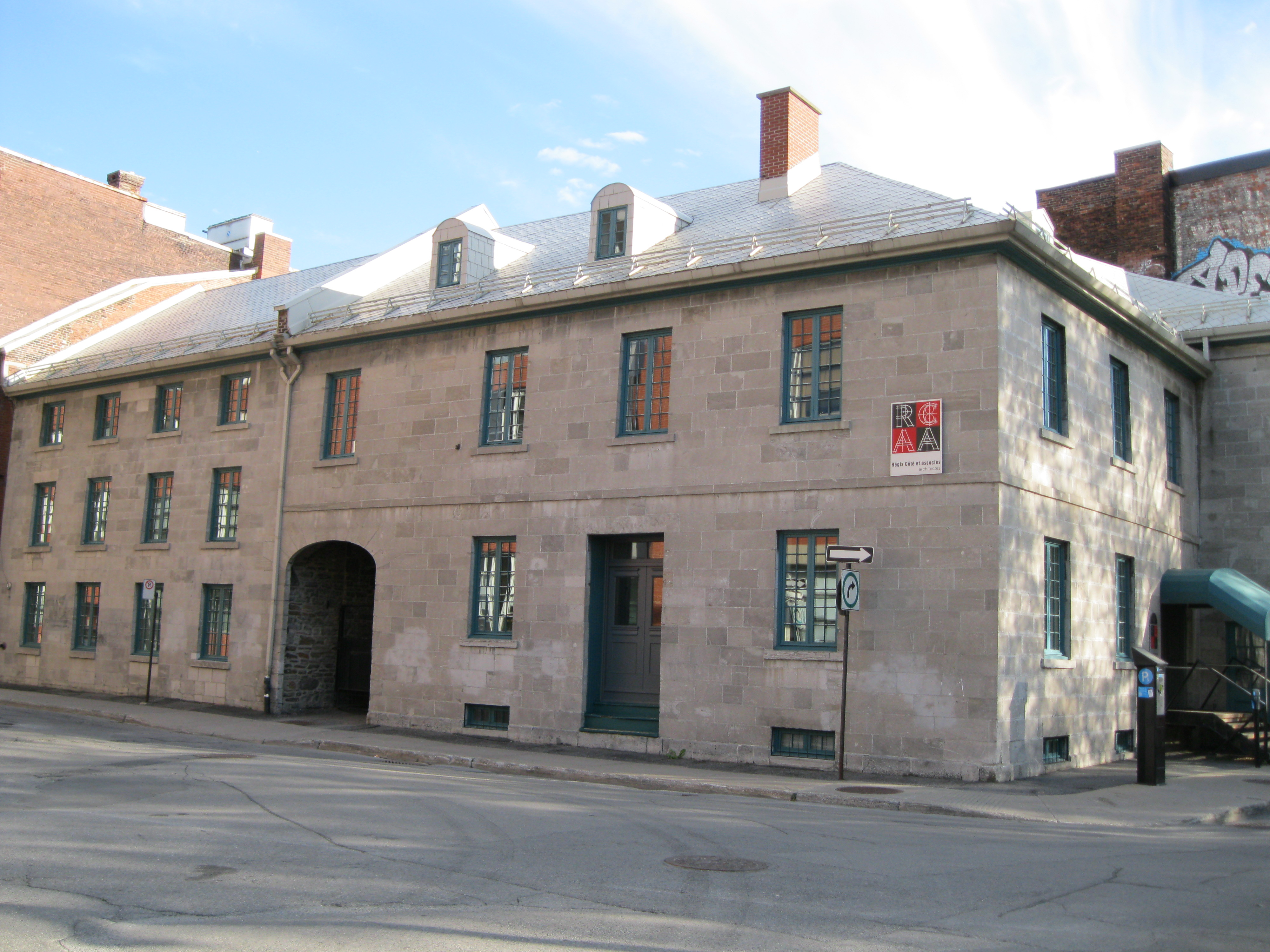 La maison Abner-Bagg est un ensemble de 3 édifices situés à l'angle des rues King et William à Montréal. Deux adresses : 166, rue King, 682, rue William.